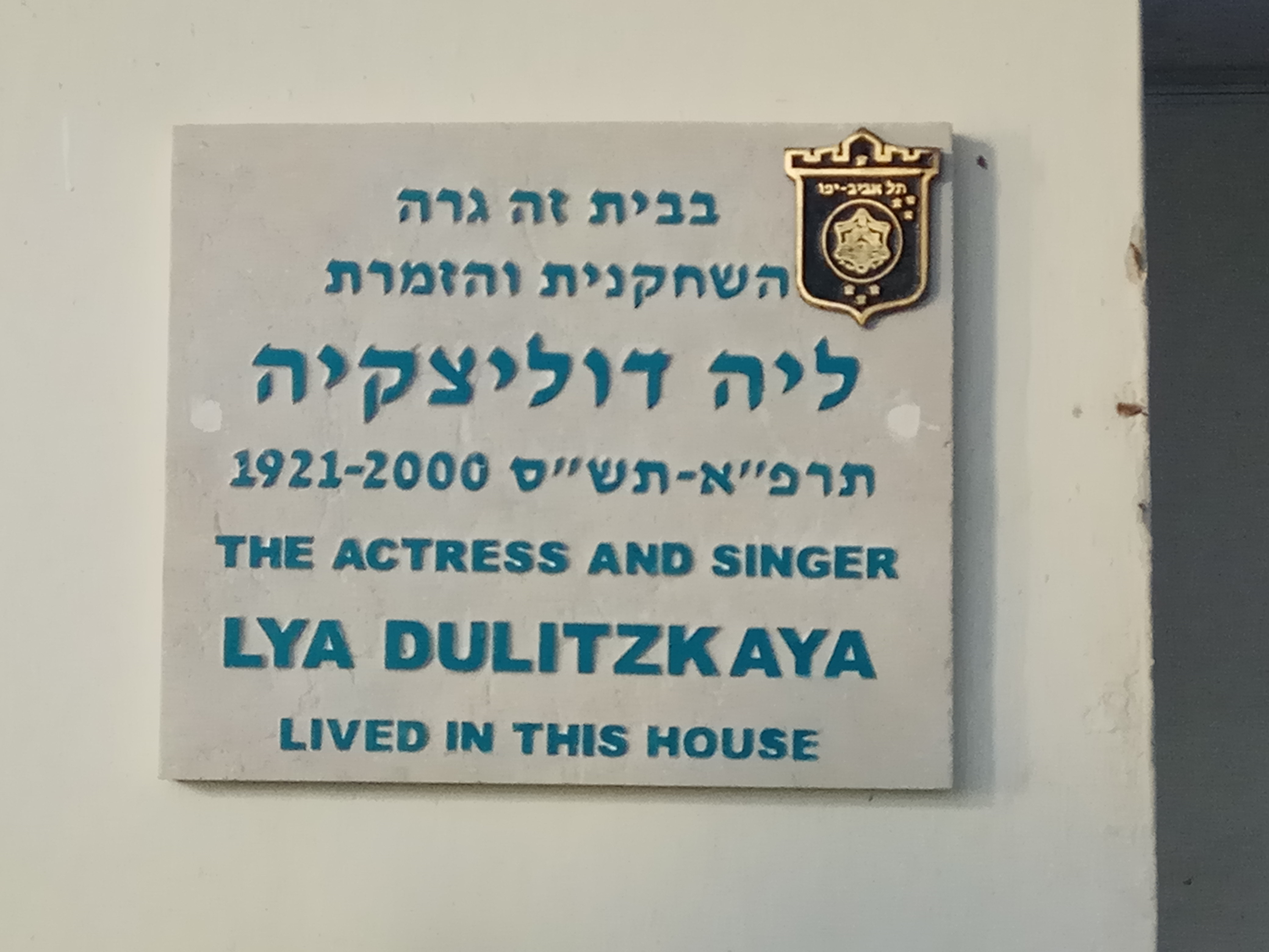 לוחית זיכרון לליה דוליצקיה ברחוב שלומציון המלכה 9 בתל אביב